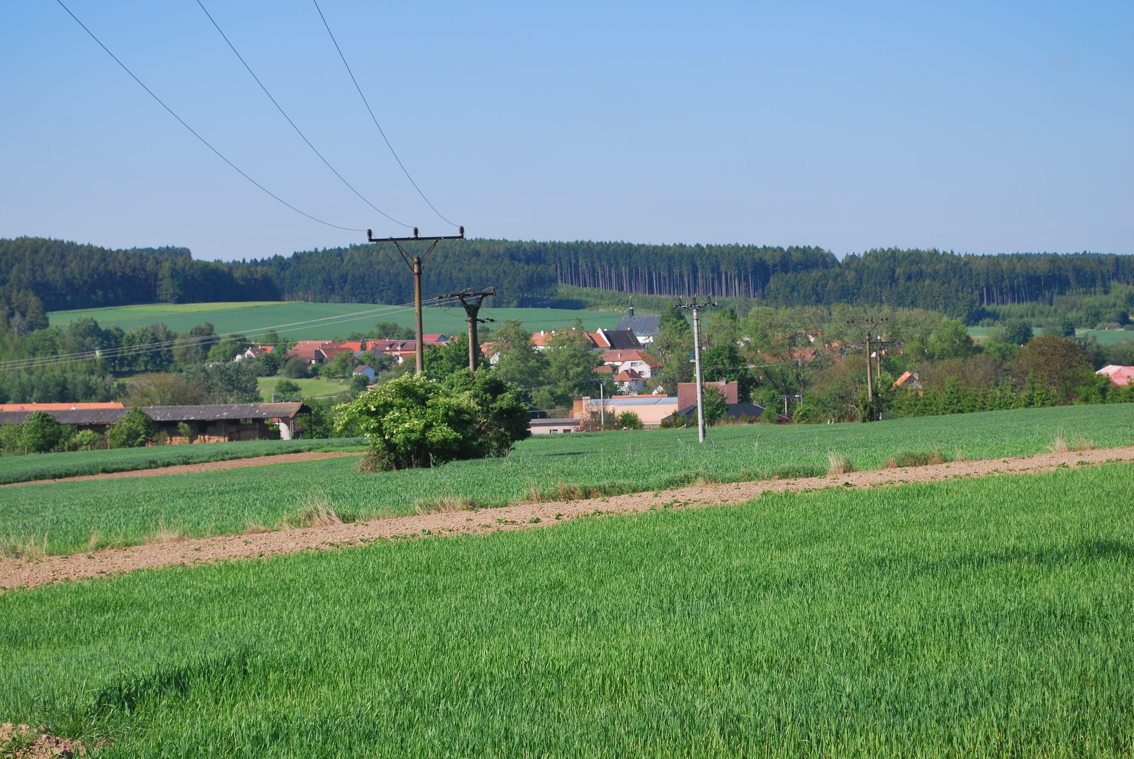 Ořechov - obec